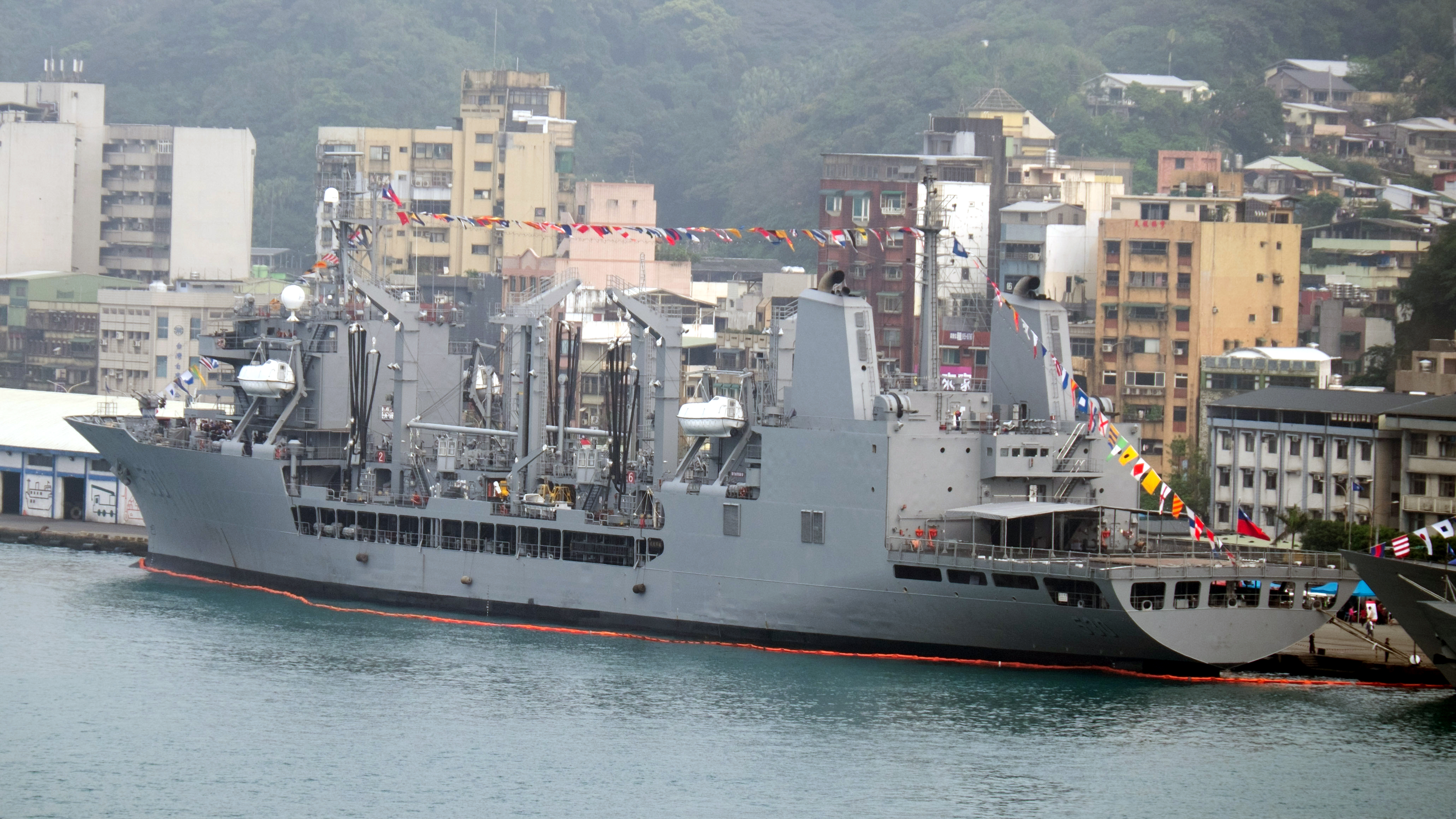 海軍104敦睦遠航訓練支隊訪問基隆期間，停泊基隆港東五號海軍碼頭的油彈補給艦武夷（AOE-530）。